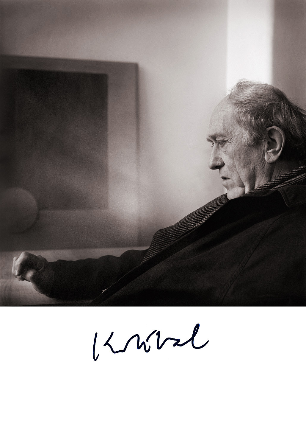 Jiří Jiroutek´s picture Cyklus: Osobnosti